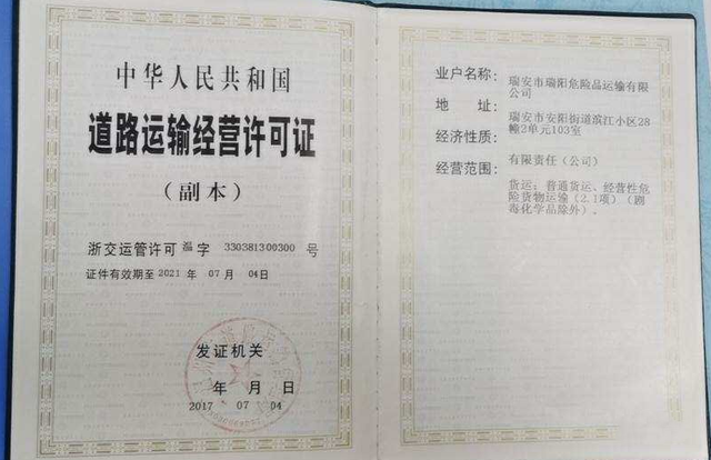 中文（中国大陆）: 瑞安市瑞阳危险品运输有限公司的《中华人民共和国道路运输经营许可证》